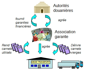 schéma de principe pour la création de conditions à l'utilisation de carnet TIR